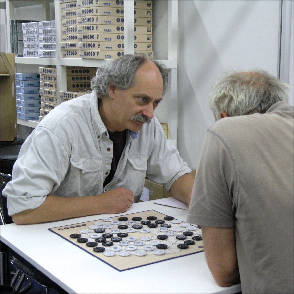 Kris Burm (Essen Spiel'07)